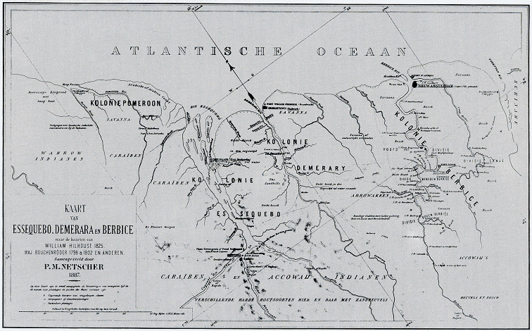 Kaart uit de Geschiedenis (1888) door P.M. Netscher (IvN). In de kolonie Berbice zijn de plaatsen aangegeven die van belang waren tijdens de slavenopstand van 1763.